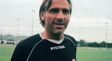 Régis Brouard, après son premier entraînement à Clermont.